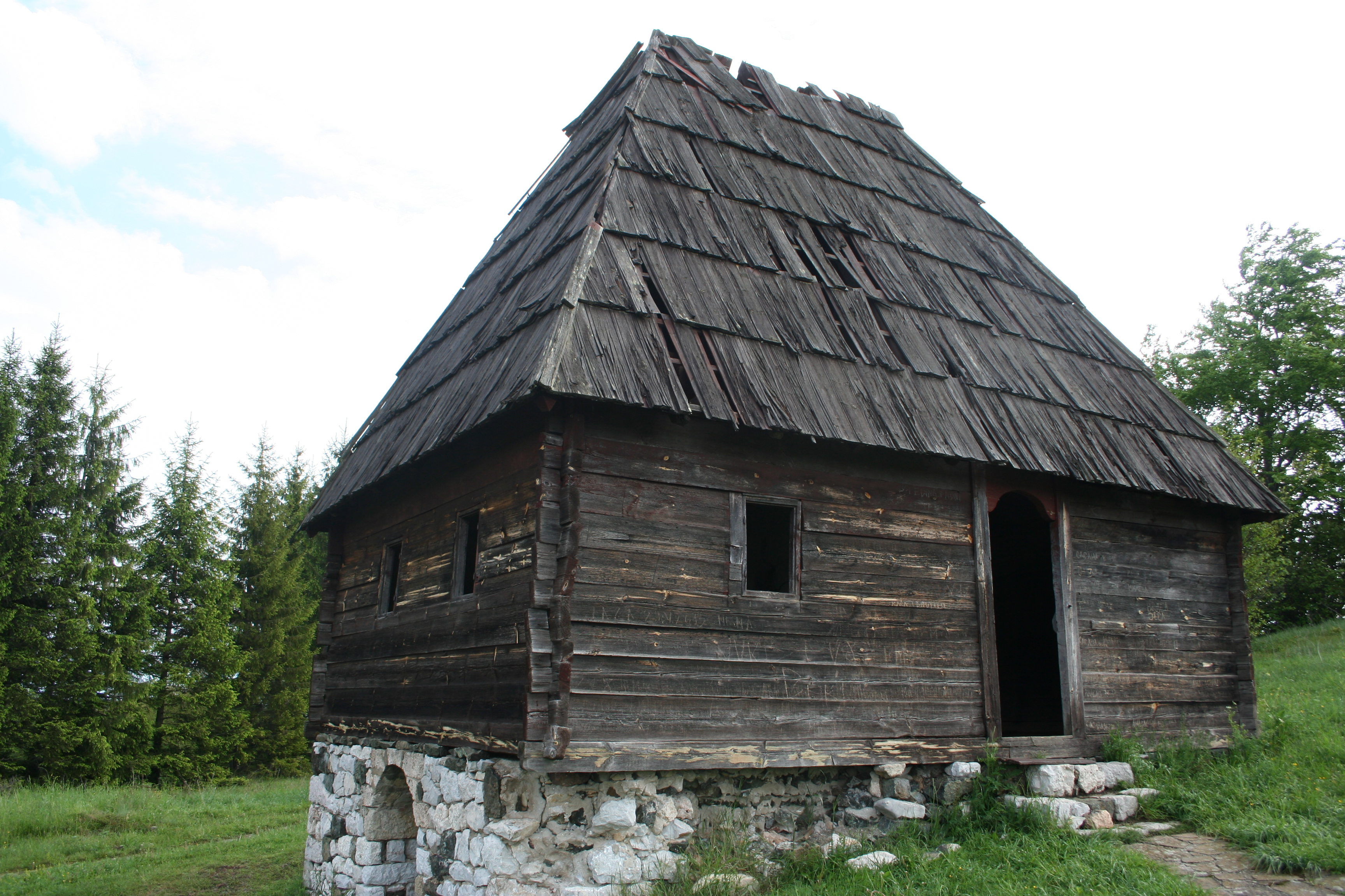 Staro domaćinstvo, Kaluđerske Bare Ово је фотографија заштићеног природног добра у Србији под шифром: НП03This is a a photo of a natural area in Serbia with ID: НП03